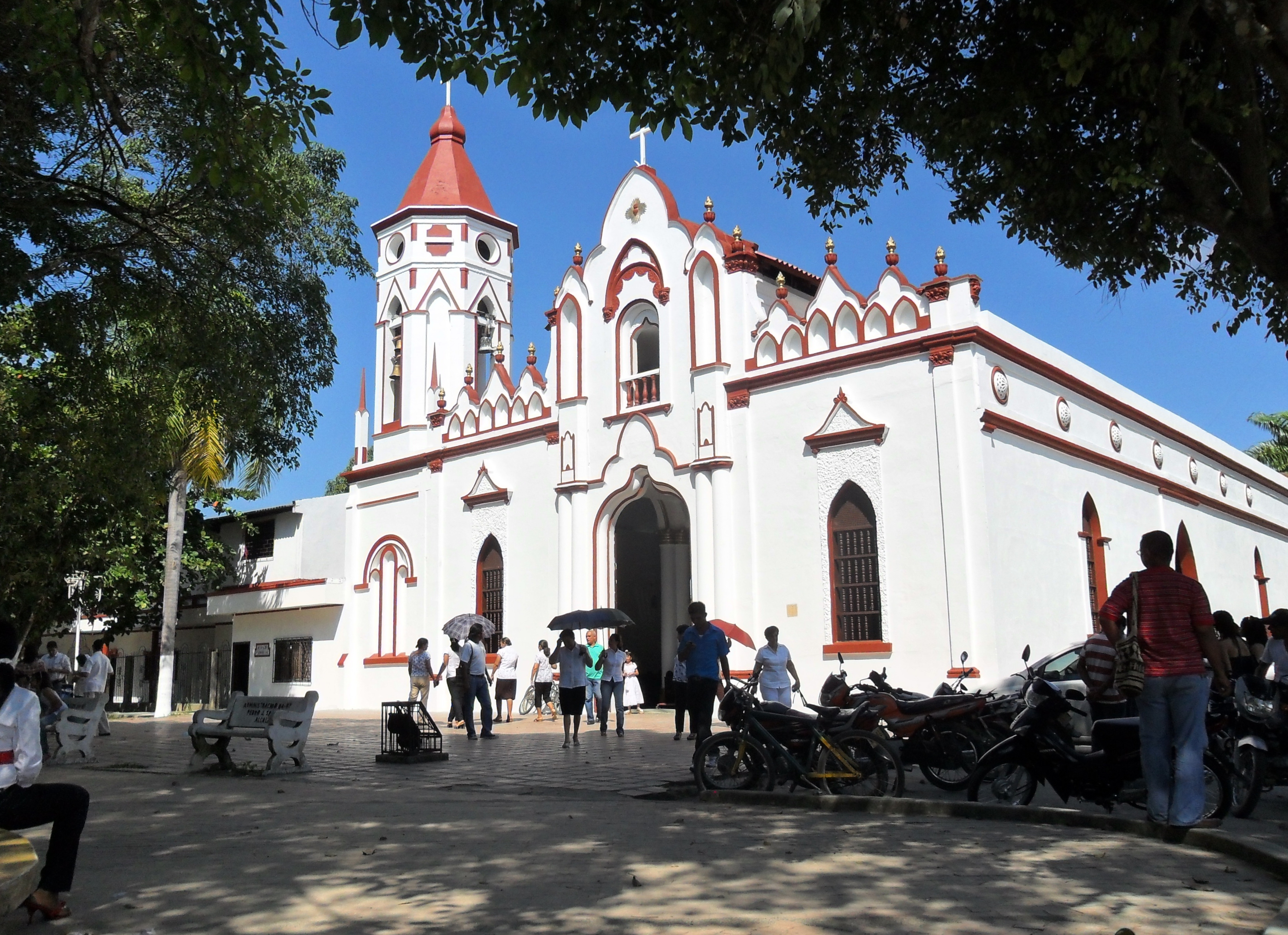 The church in Aracataca where Garcia Marquez was baptized, right on the central park